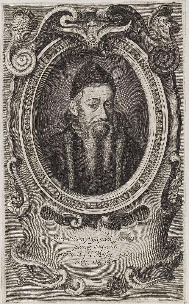 Grafik aus dem Klebeband Nr. 3 der Fürstlich Waldeckschen Hofbibliothek Arolsen Motiv: Georg Mauricius (1539–1610), Rektor der Lateinschule in Steyr; Vater von Georg Mauricius dem Jüngeren (1570-1631); Dichter